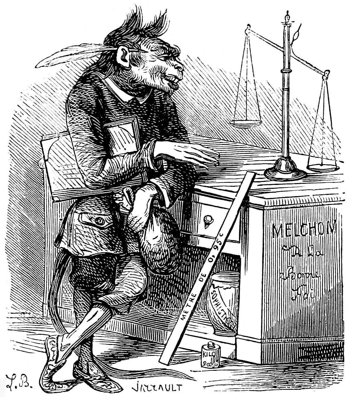 Melchom. Illustration du Dictionnaire infernal par Louis Le Breton, 6eme édition, 1863.